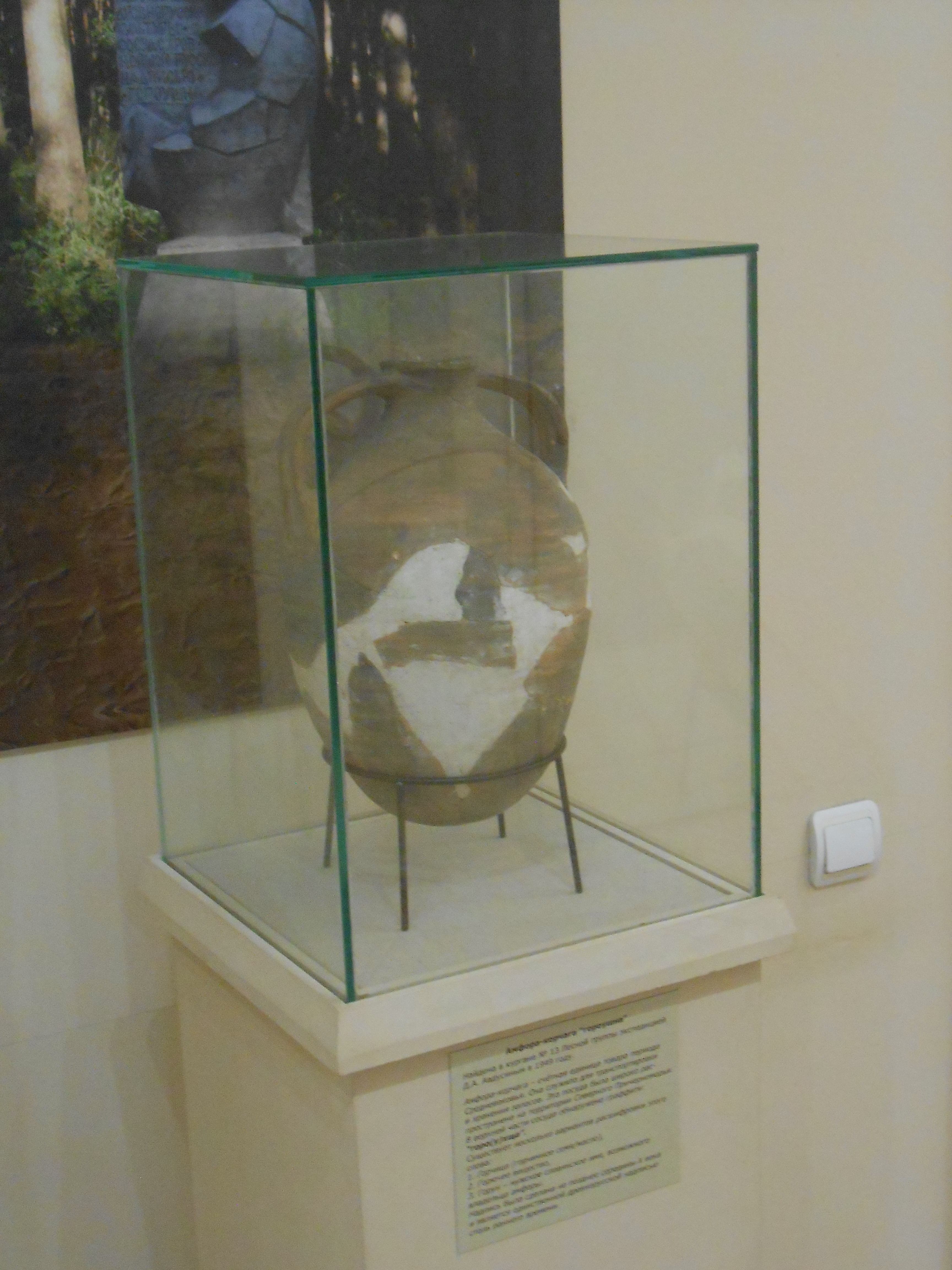 Смоленский Исторический музей.